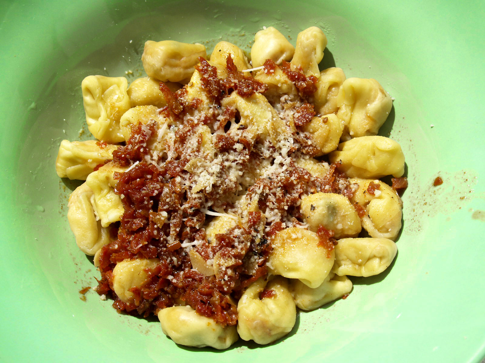 Laksetortellini med tomat- og hvidvinssauce